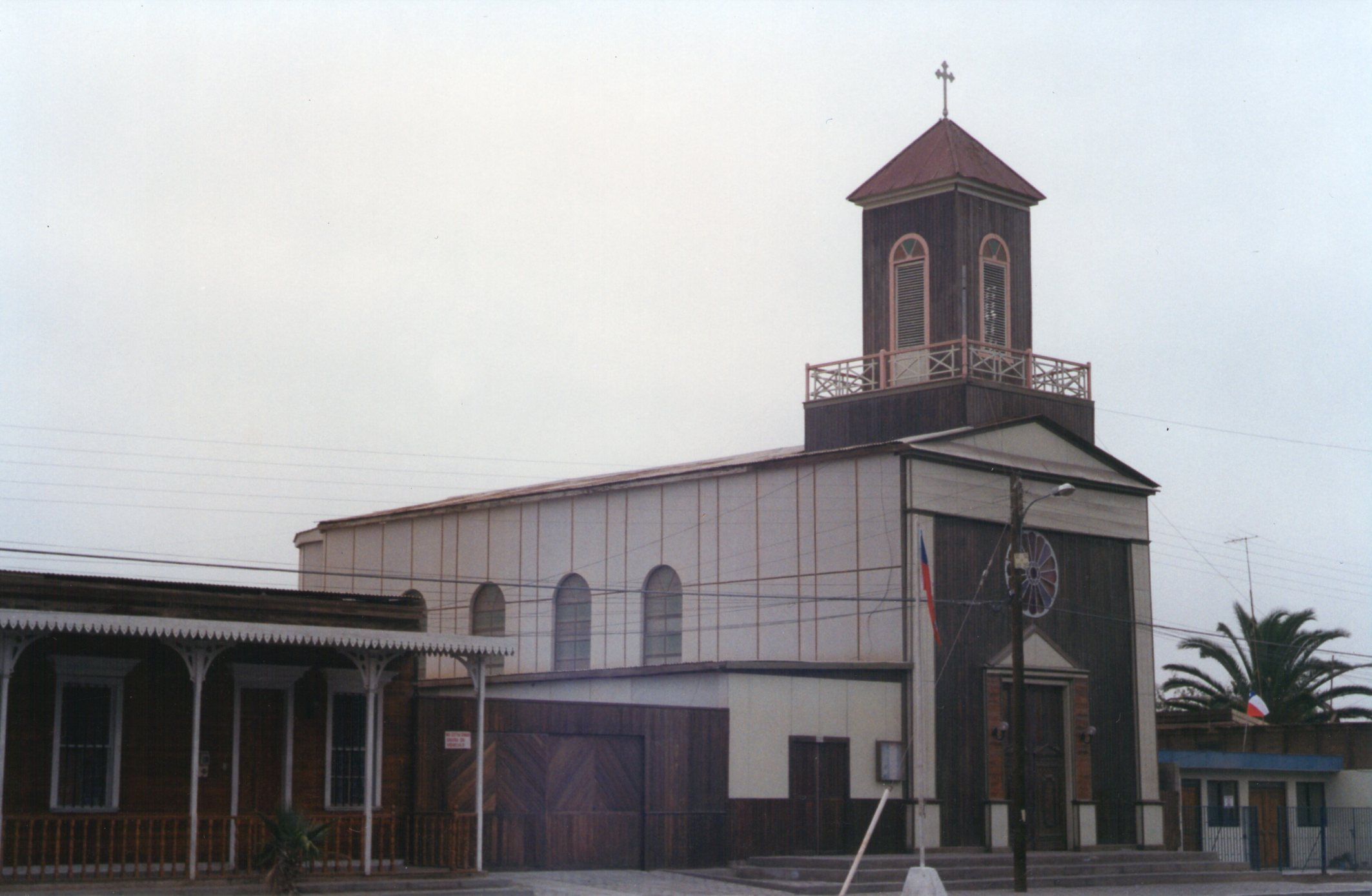 Iglesia de Pozo Almonte (1996)